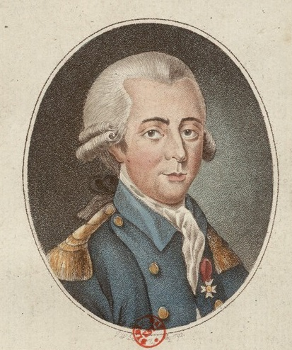 Thomas de Mahy de Favras : chevalier de l'Ordre royal et militaire de St Louis né le 26 mars 1744 condamné le 18 fevrier 1790 mort le 19 avec la résignation le courage et la fermeté d'une conscience pure et sans reproche, estampe.